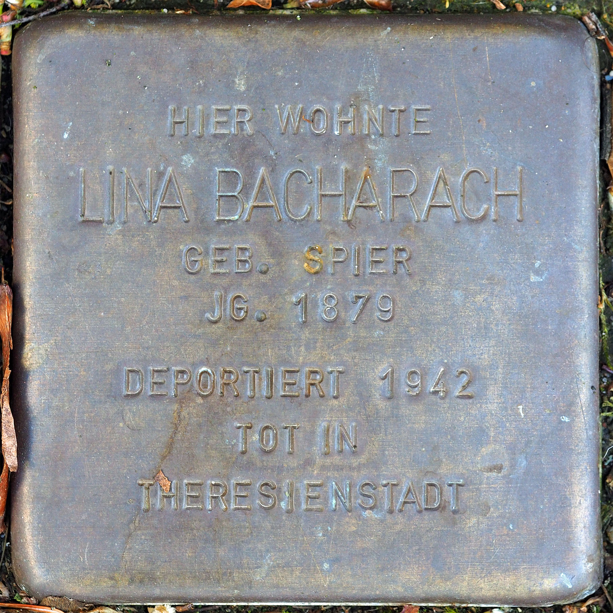 Stolpersteine MG: Bacharach, Lina